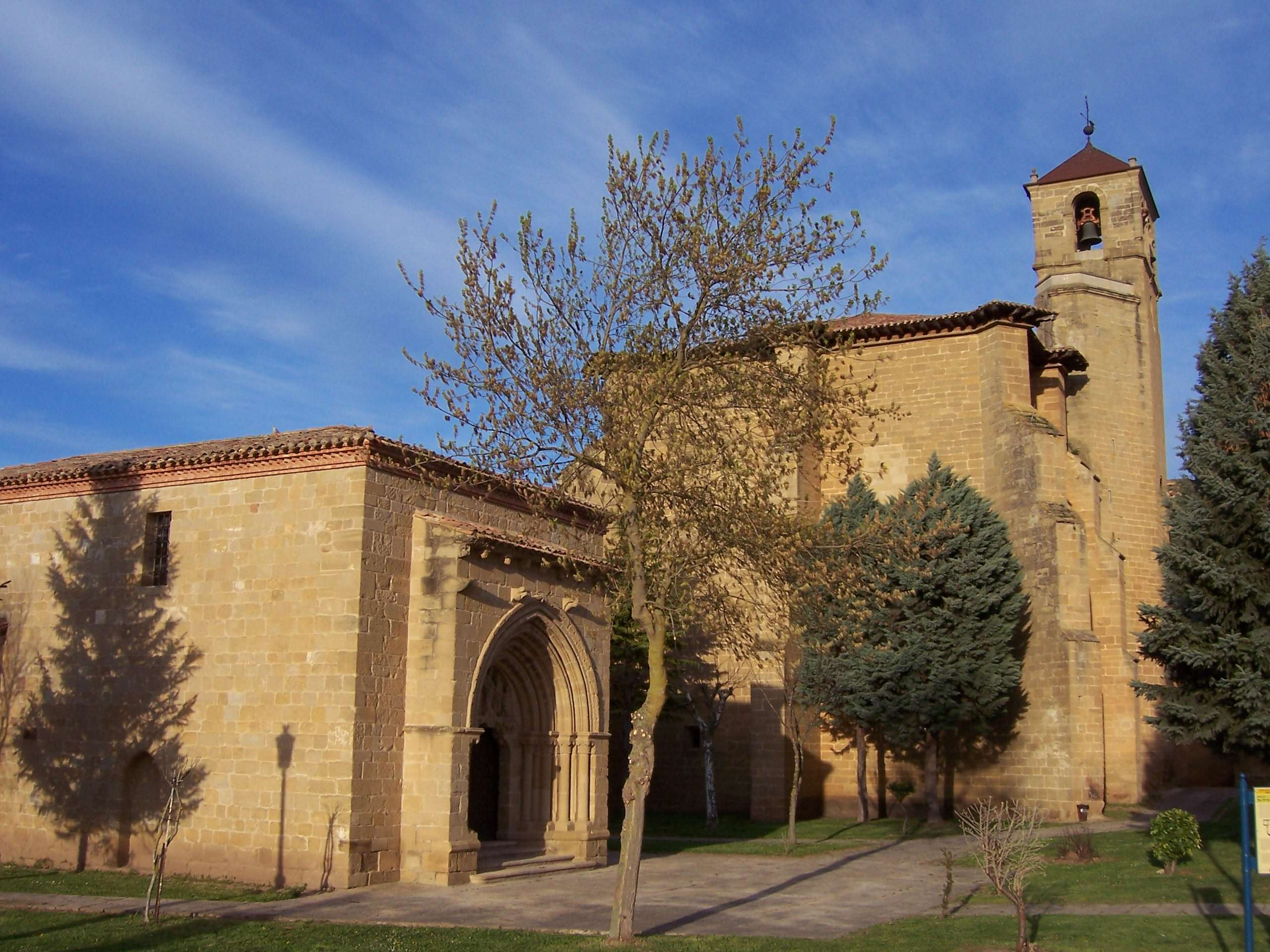 Iglesia parroquial de la Santa Cruz y Ermita de la Santa Cruz - Bañares - La Rioja - España